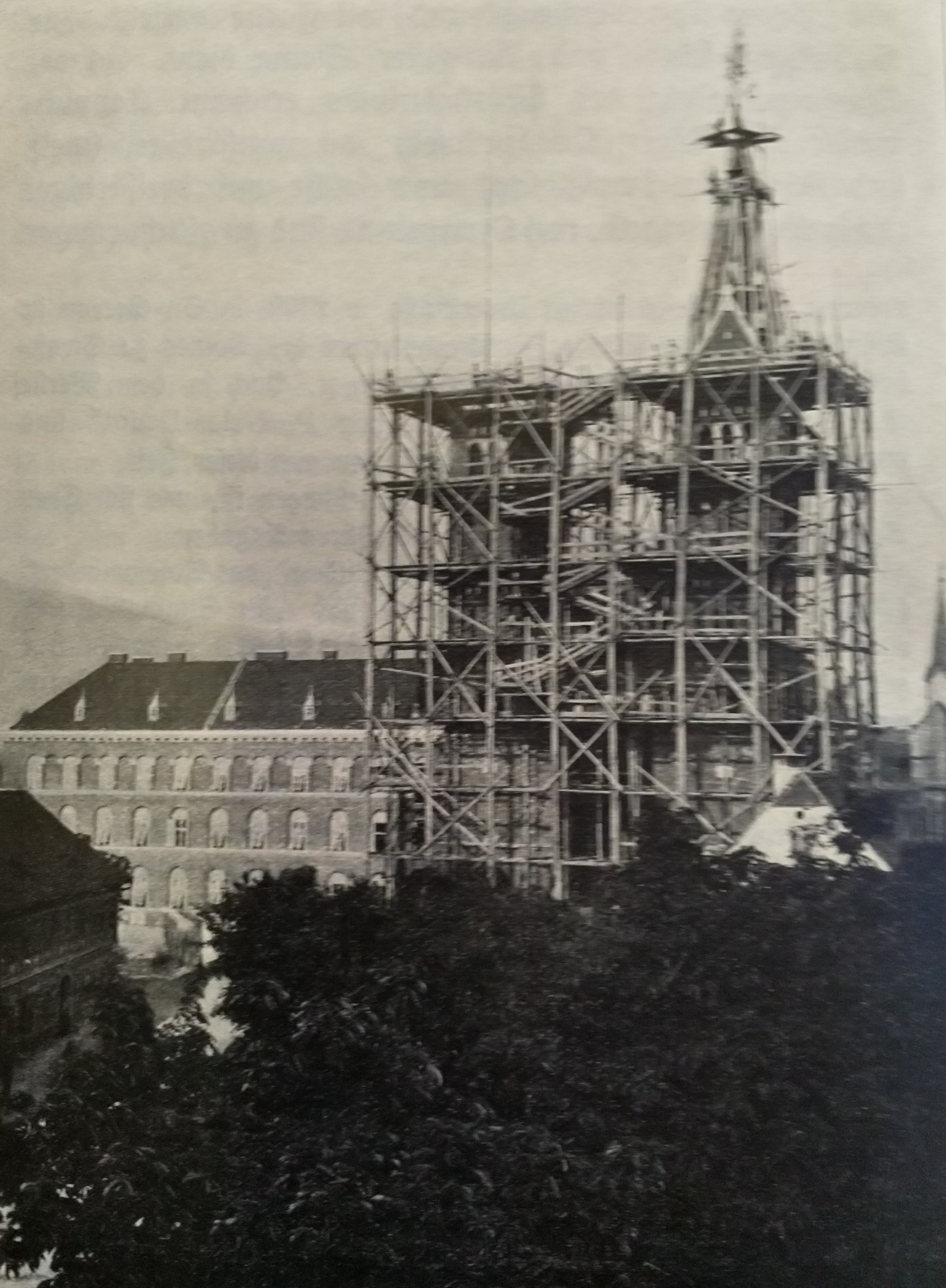 Frančiškanska cerkev med gradnjo